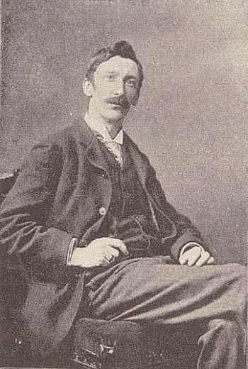 Painter Stanhope Forbes (1857-1947)